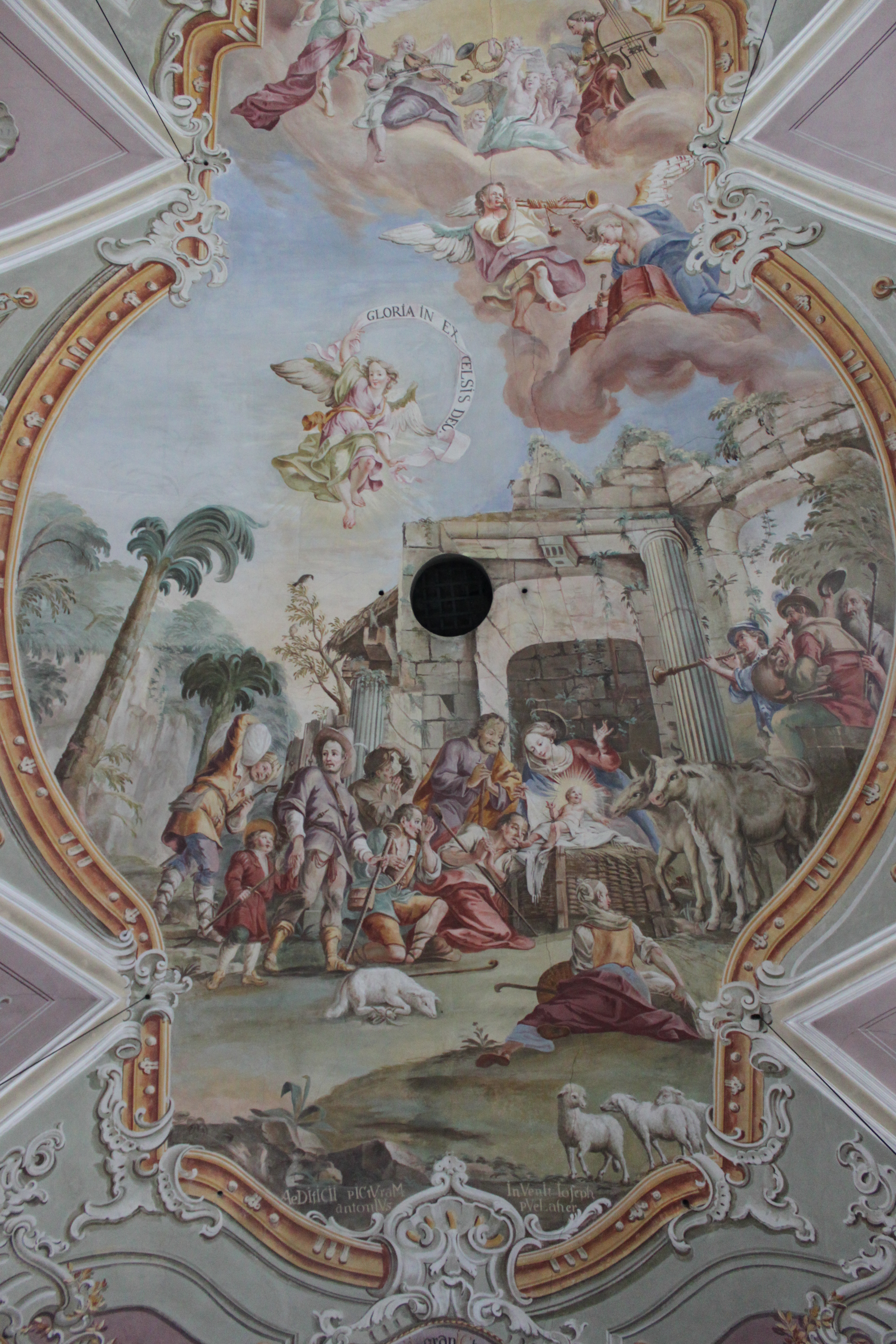 Hirtenanbetungtitle QS:P1476,de:"Hirtenanbetung" label QS:Lde,"Hirtenanbetung"